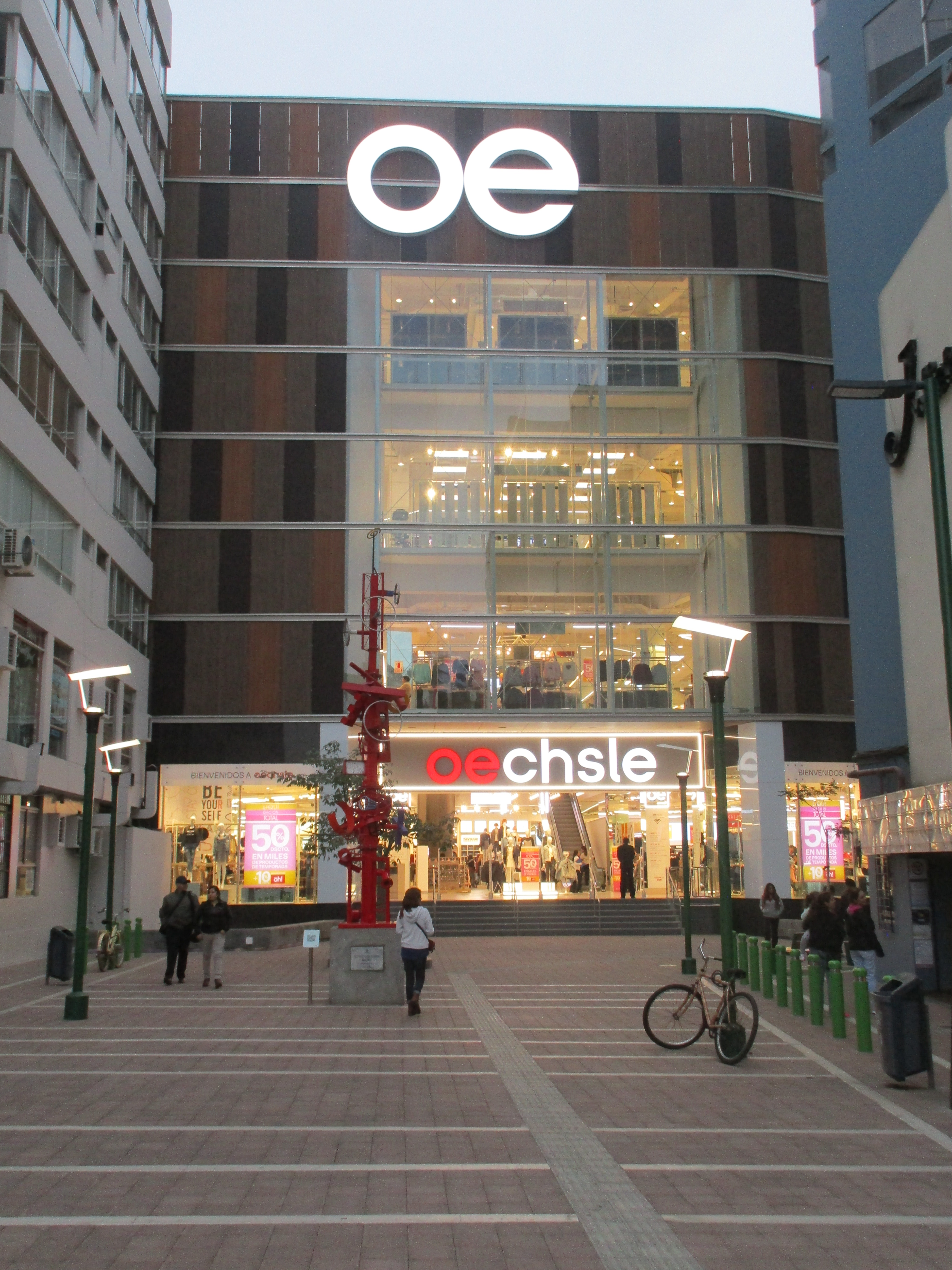 Oechsle en Lima, Perú.